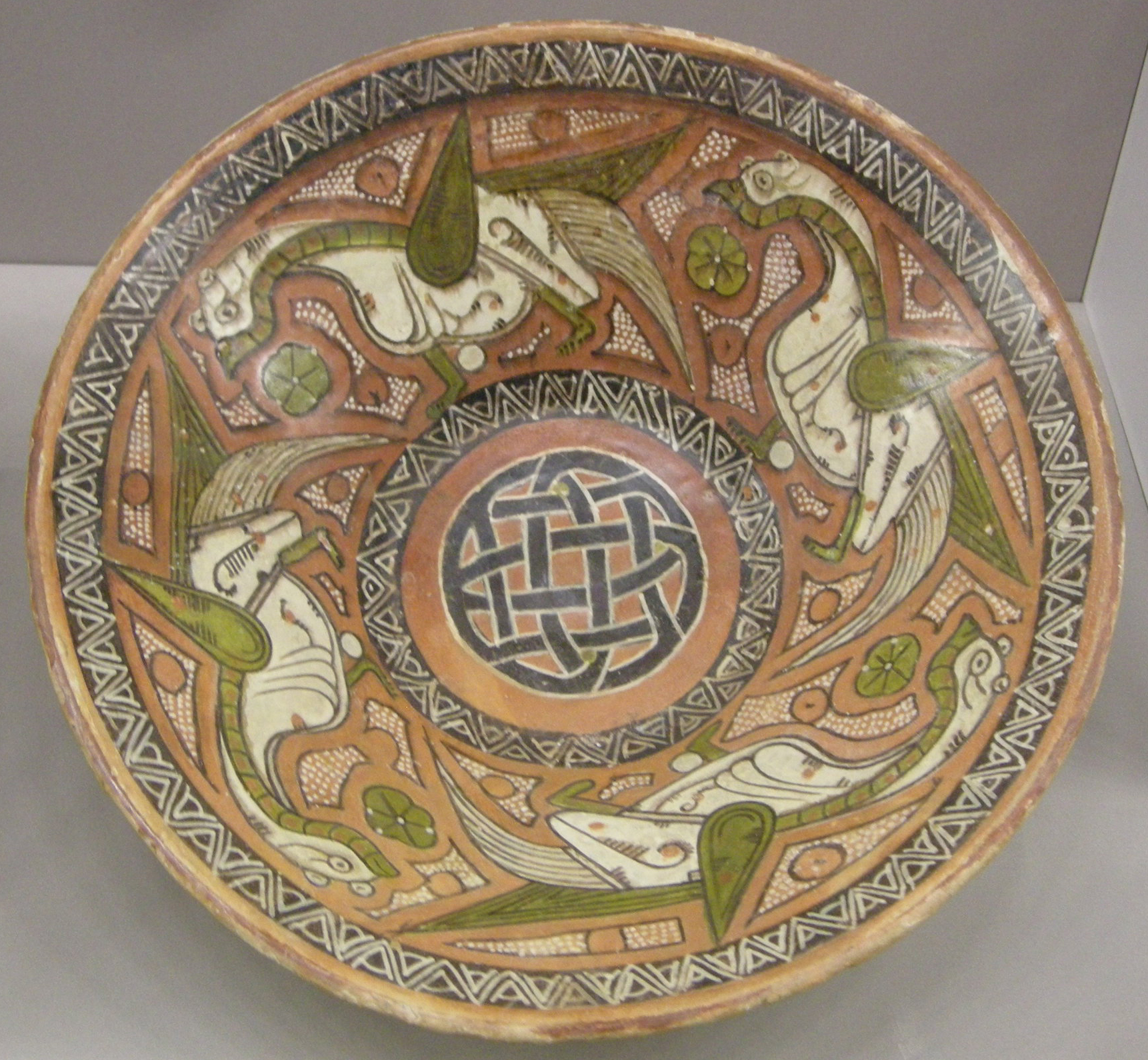 Iran orientale o asia centrale, coppa, x sec